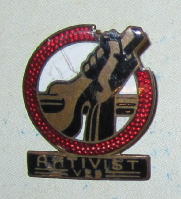 Aktivistenabzeichen Zweijahrplan 1950